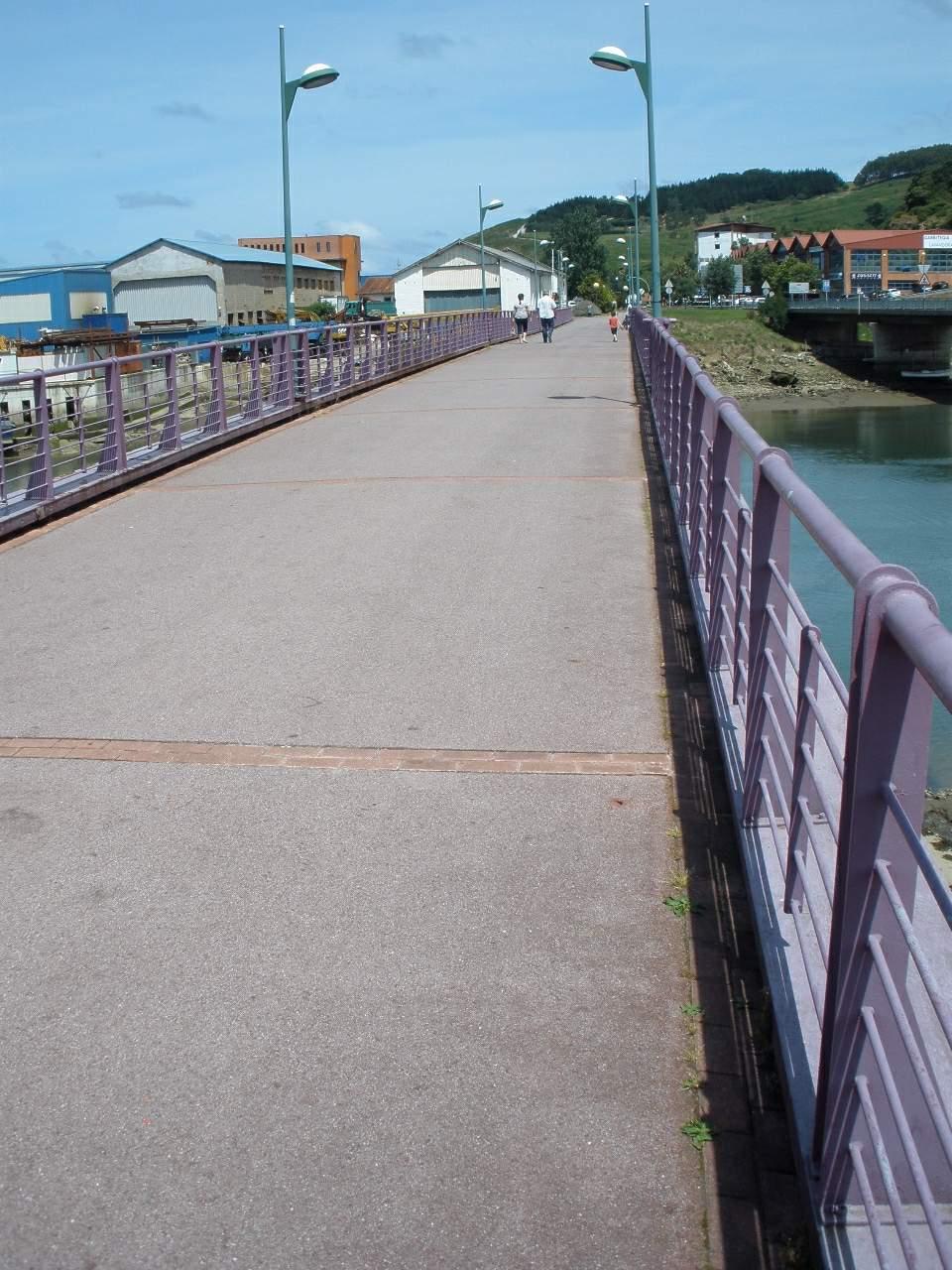 Puente sobre el Urola, Zumaia